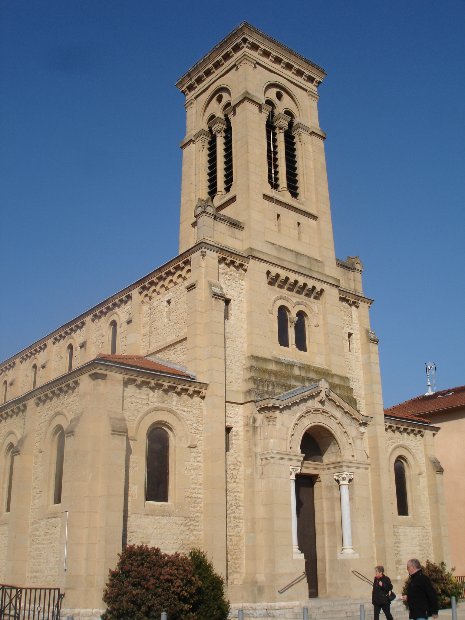 Heyrieux (38) : Le clocher de l'église